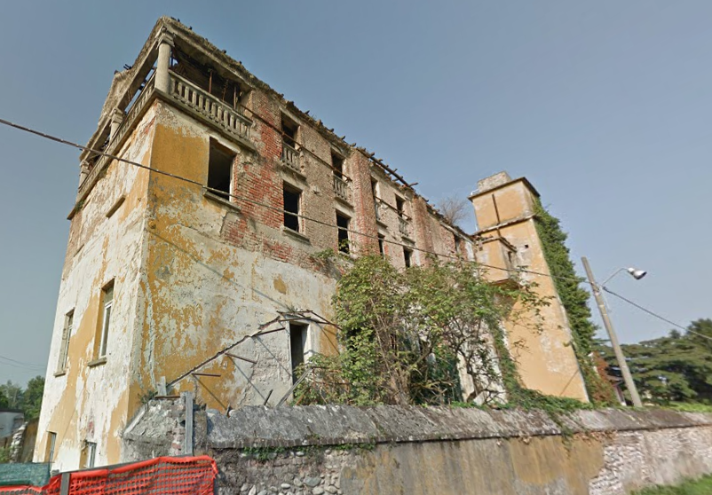 Folla della carta in località Magnana nel comune di Boffalora sopra Ticino (MI) - Italy